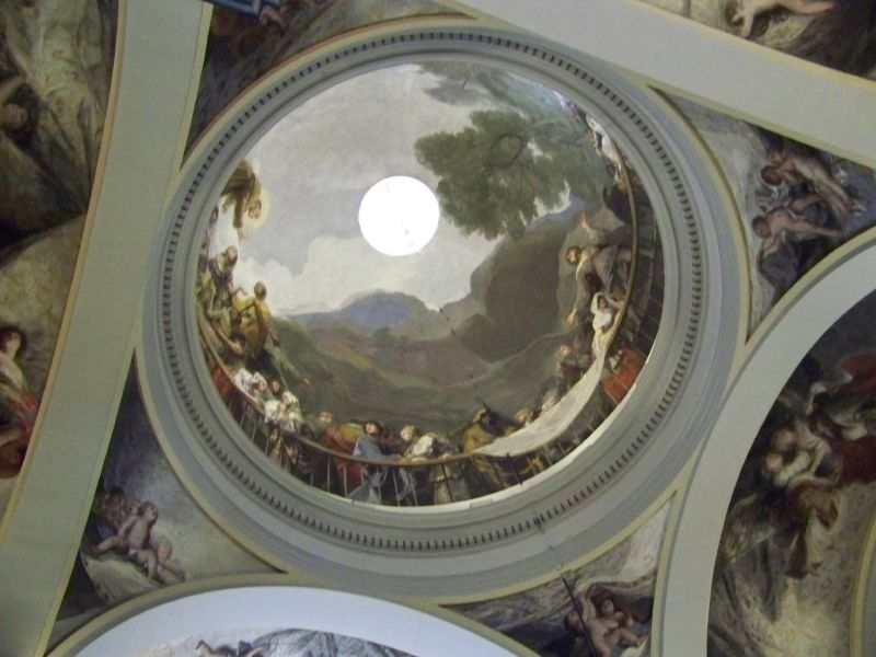 Kuppelfresko in San Antonio de la Florida, Madrid, Szene aus der Legende des Hl. Antonius von Padua: Der Heilige erweckt einen Toten in Lissabon, der die Unschuld seiner Eltern bezeugt, Gesamtansicht